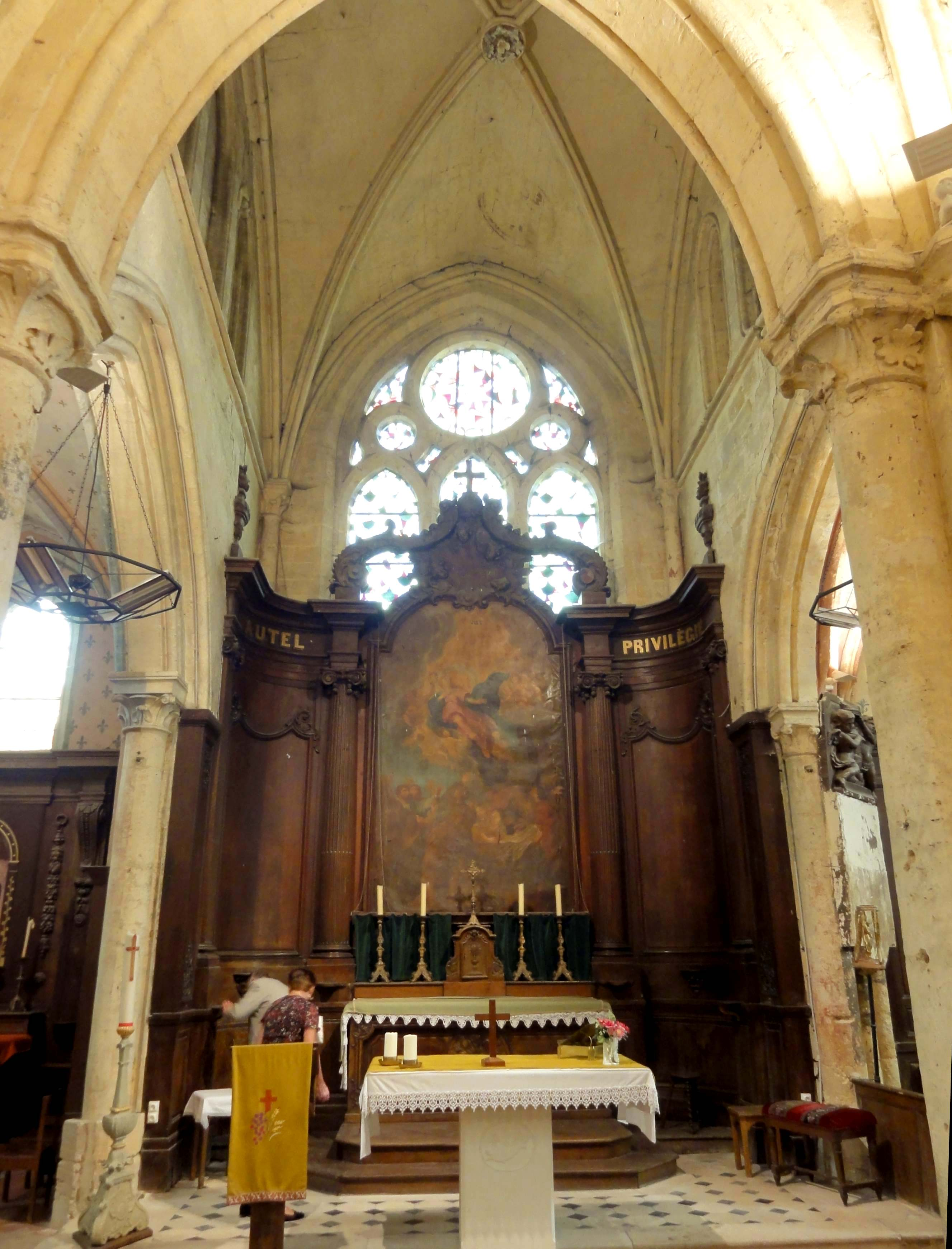 Intérieur de l'église (voir titre).